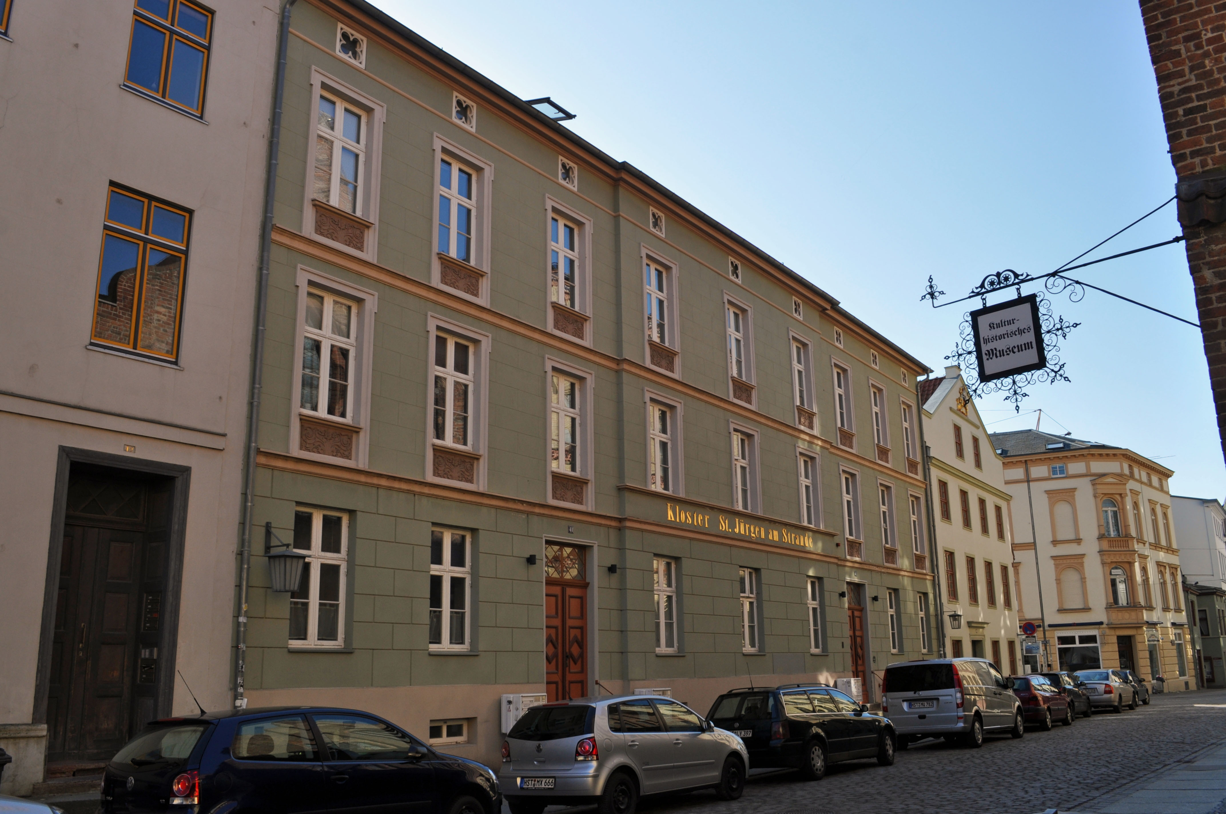 Gebäude bzw. Gebäudedetail in Stralsund. Straße und Hausnummer siehe Dateiname.